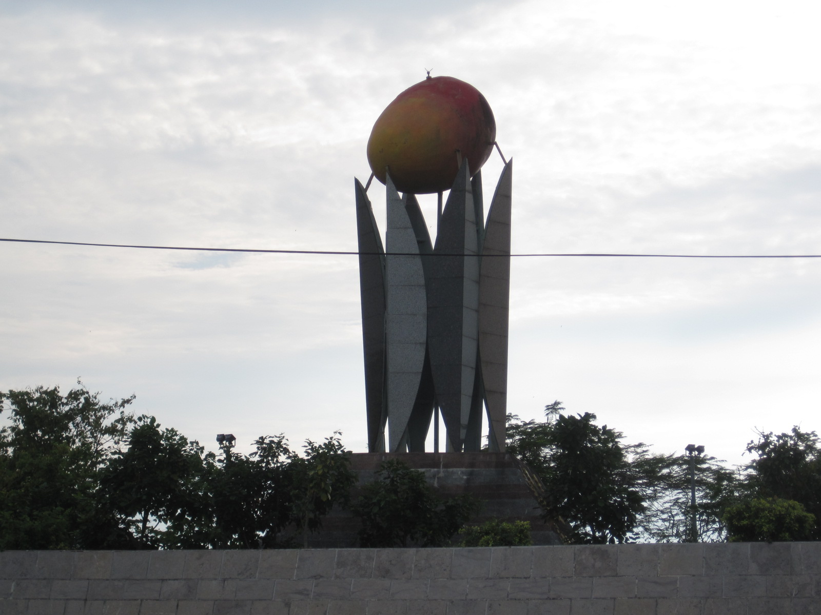 臺南玉井芒果地標。